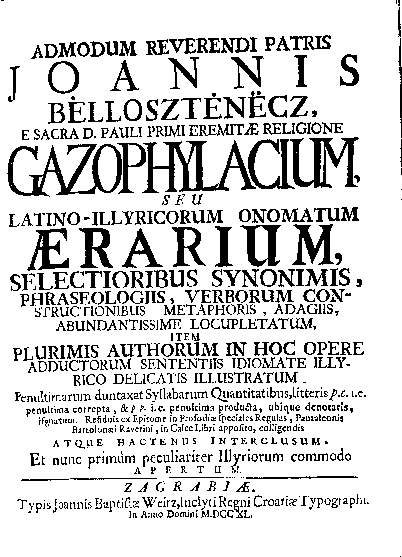 Ivan Belostenec, Gazophylacium latinum-illyricum, seu latino-illyricorum onomatum aerarium